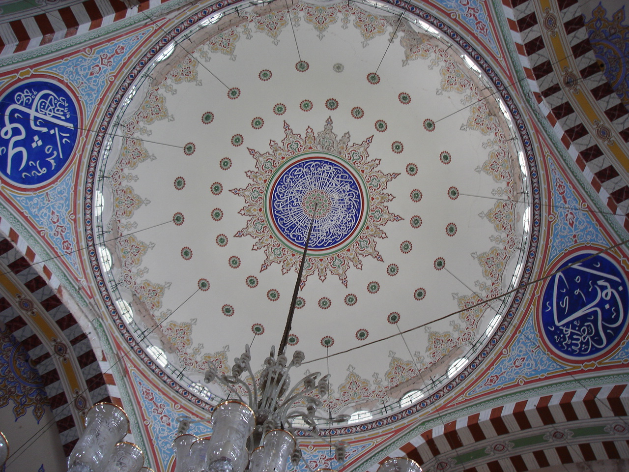 La cupola della moschea detta "Fatih camii" ("la moschea del Conquistatore") o "Fatih Memhet camii" ("la moschea di Maometto il Conquistatore"), ad Istanbul. Foto di: Giovanni Dall'Orto, 26-5-2006.